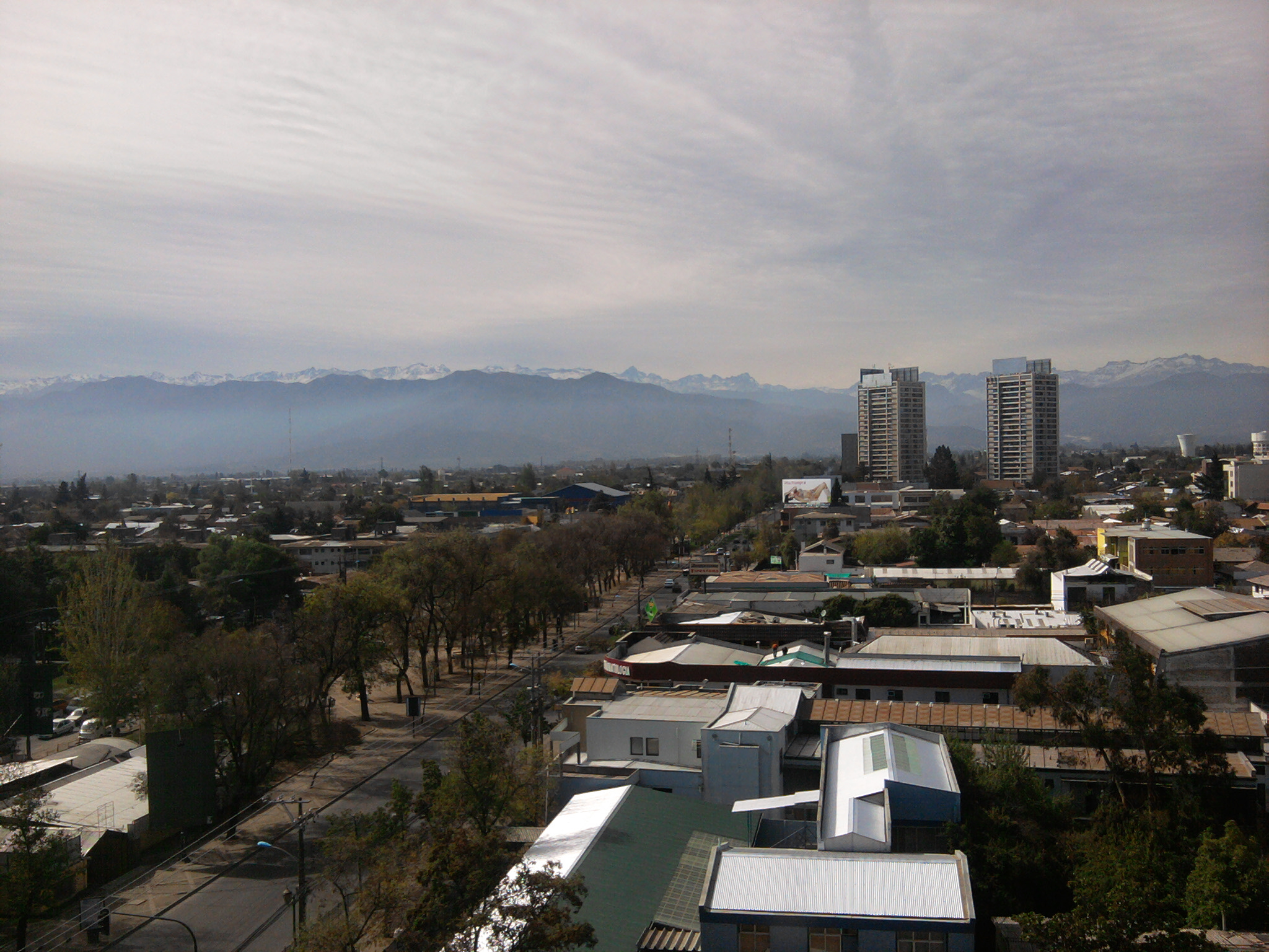 Vista de Rancagua al oriente, desde la azotea de la Clínica Integral